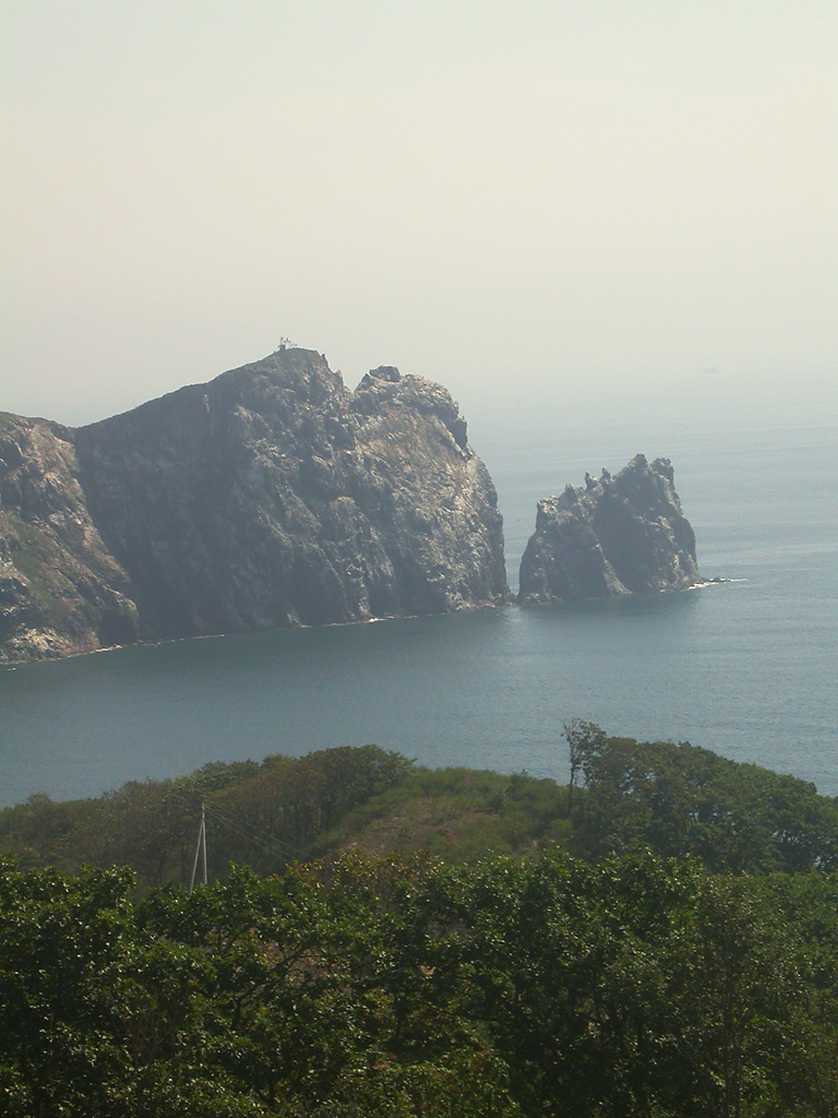 Nakhodka, Autumn, 2003